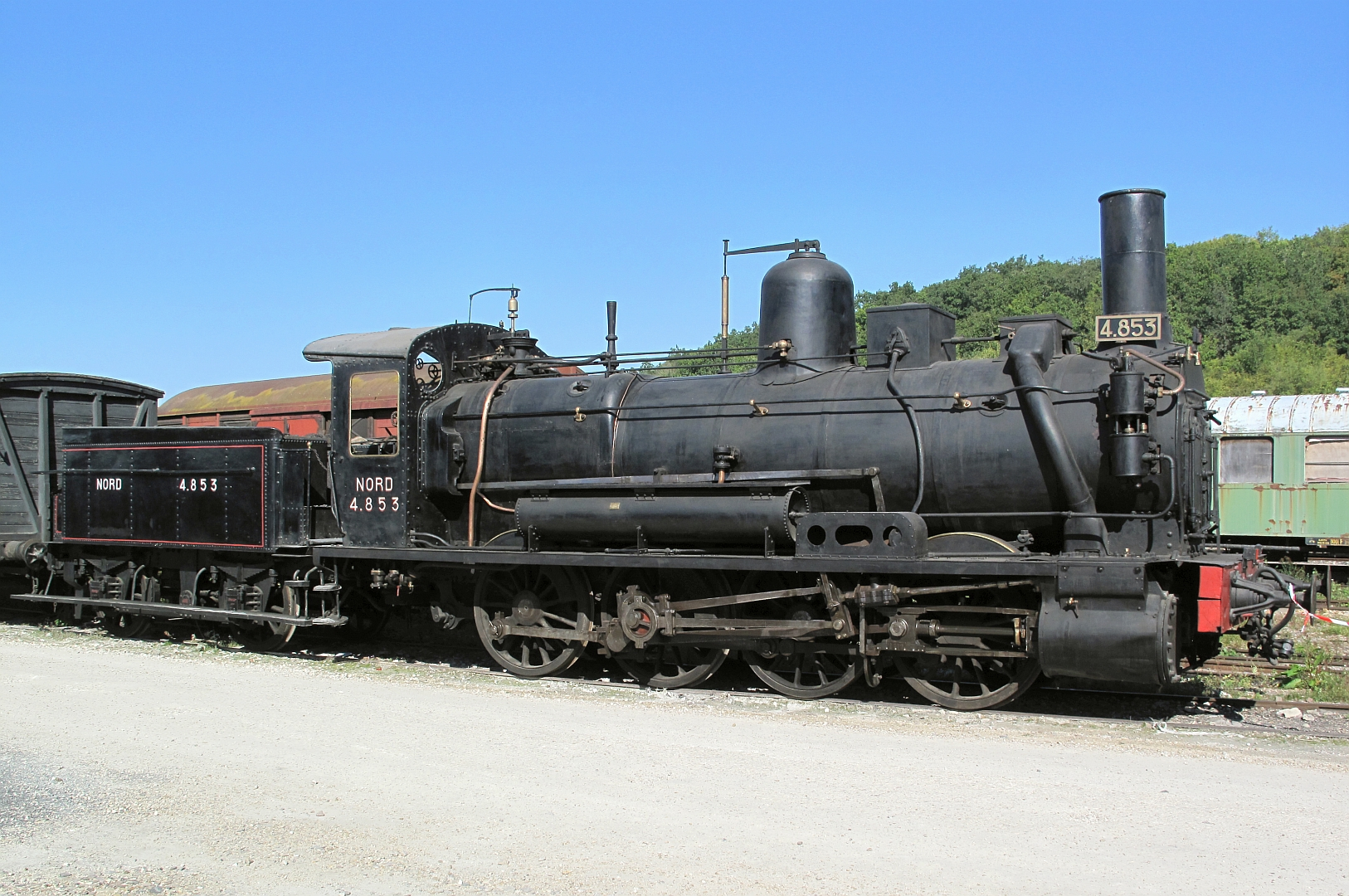 La 040 4.853 Nord à Longueville le 19 septembre 2010.